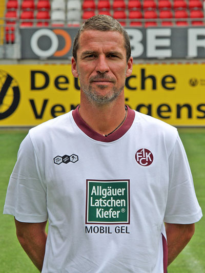 Marco Kurz, Cheftrainer des 1. FC Kaiserslautern